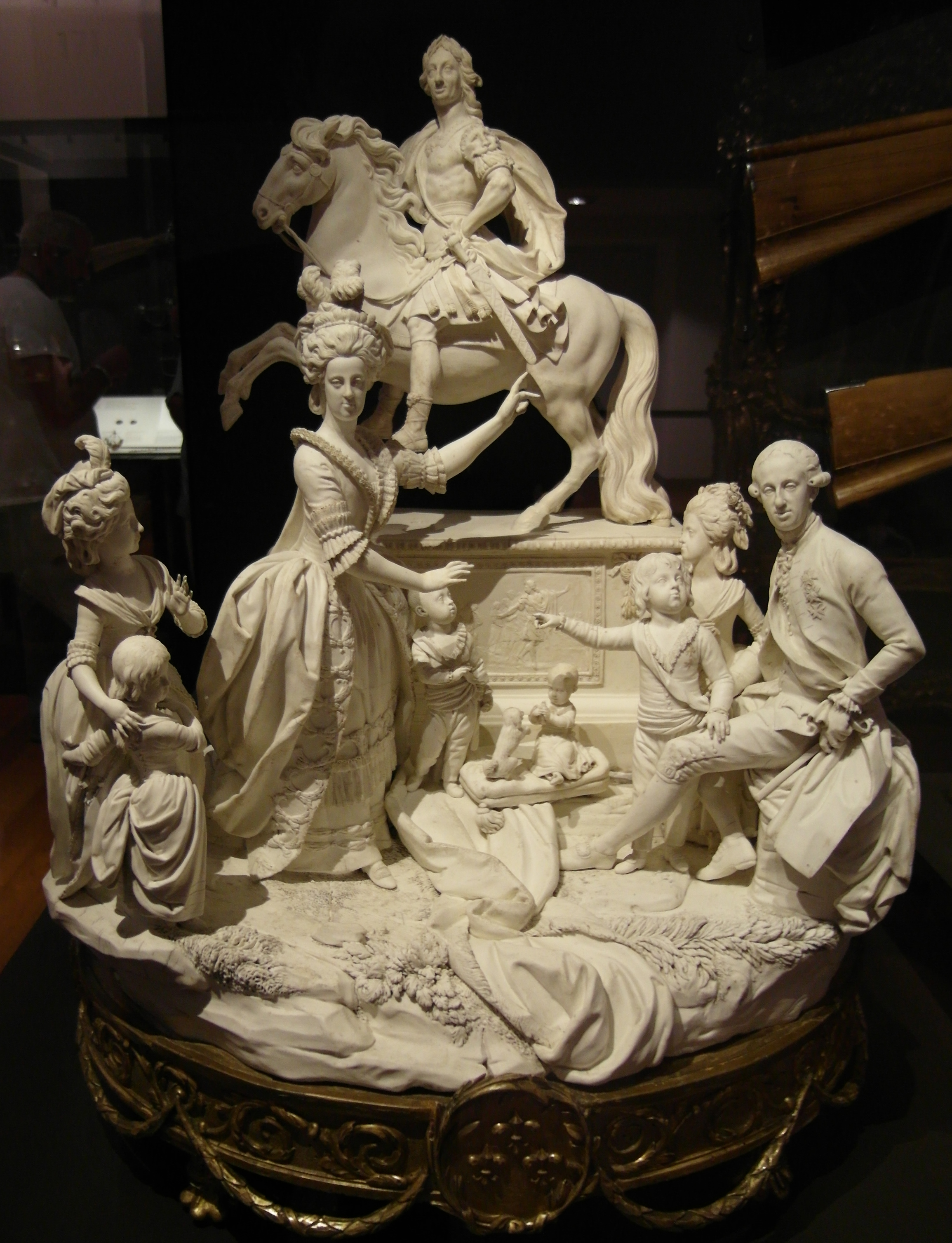 Porcelana con la familia de Fernando IV de Nápoles, su espos, sus seis hijos y Carlos III de España (su padre). Hacia 1784, obra de Filippo Tagliolini.